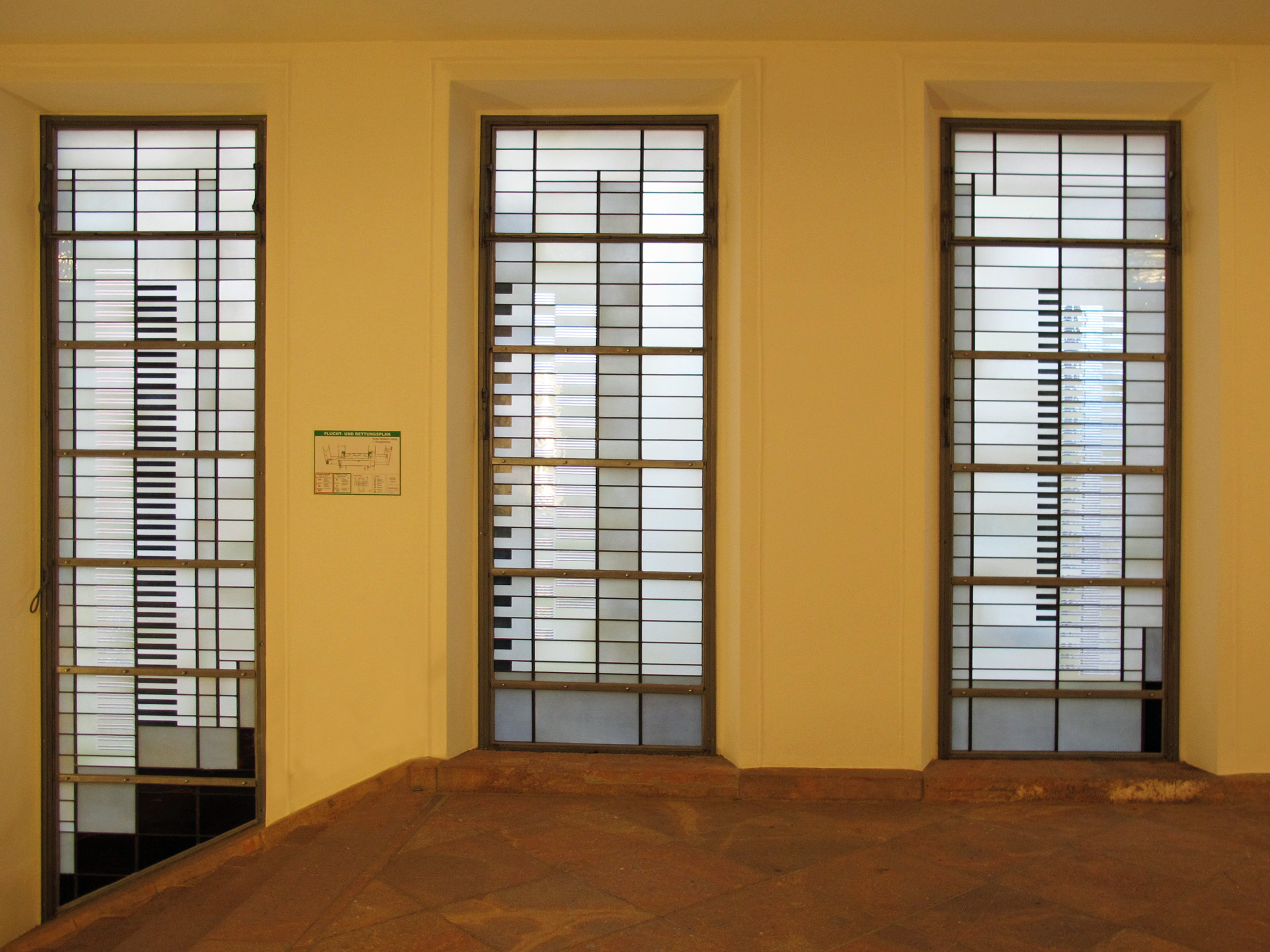 Grassimuseum, rekonstruierte Josef-Albers-Fenster im Treppenhaus